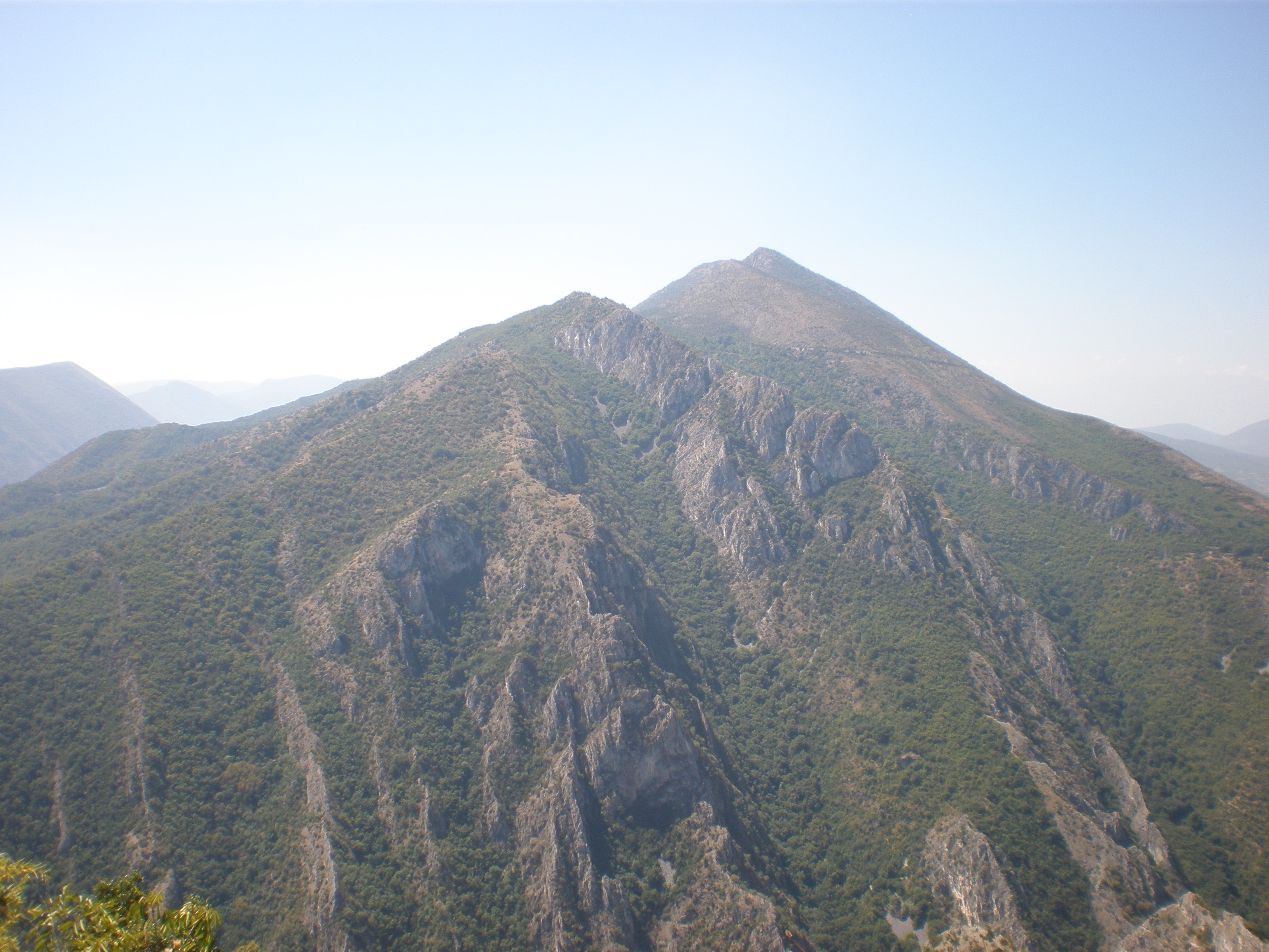 Падината Ивање на планината Осој во кањонот Матка, Македонија